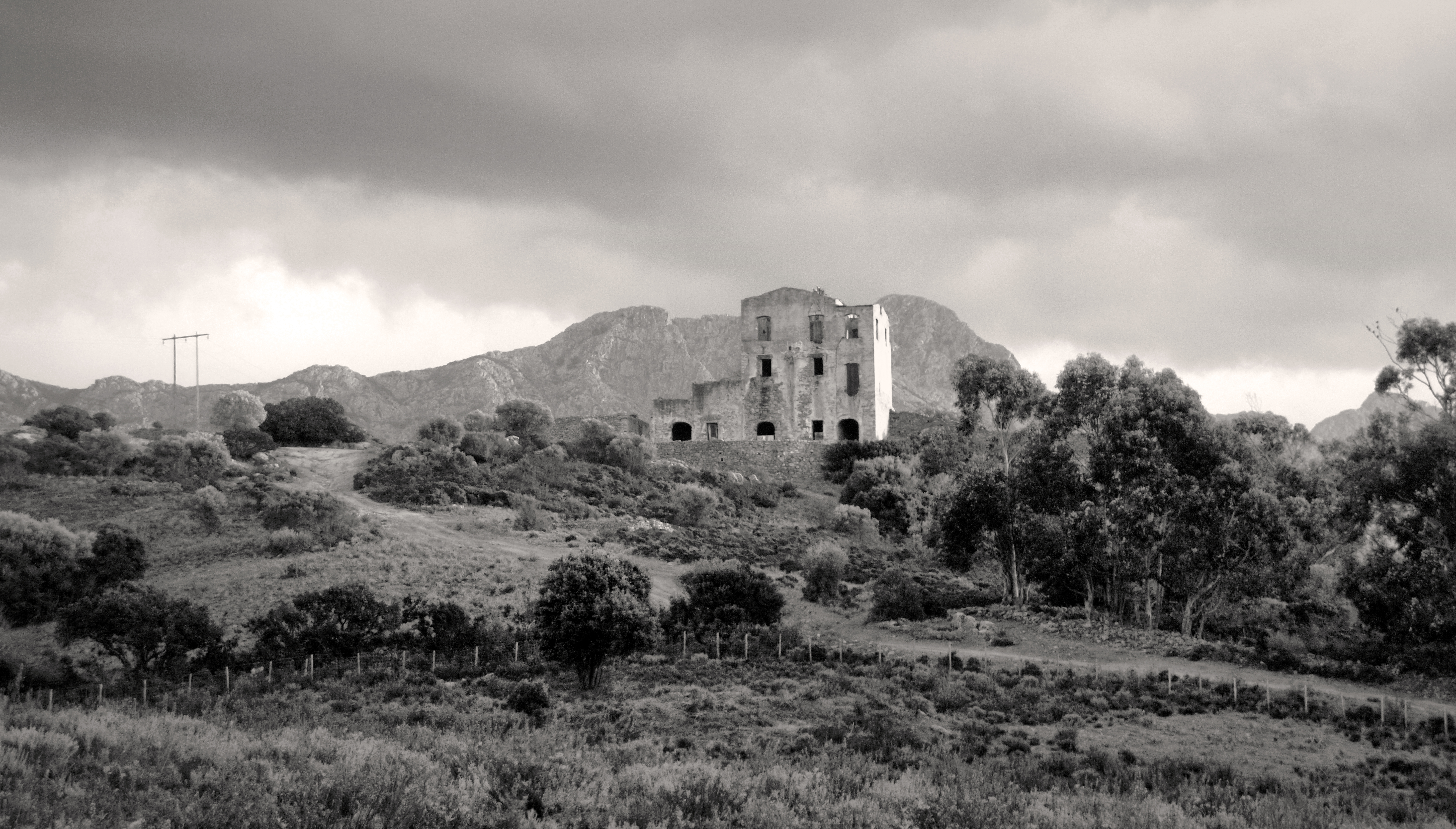 Calenzana, Balagne (Corse) - Maison de chasse du prince Pierre-Napoléon Bonaparte au lieu-dit Luzzipeo (lo Cipeo)